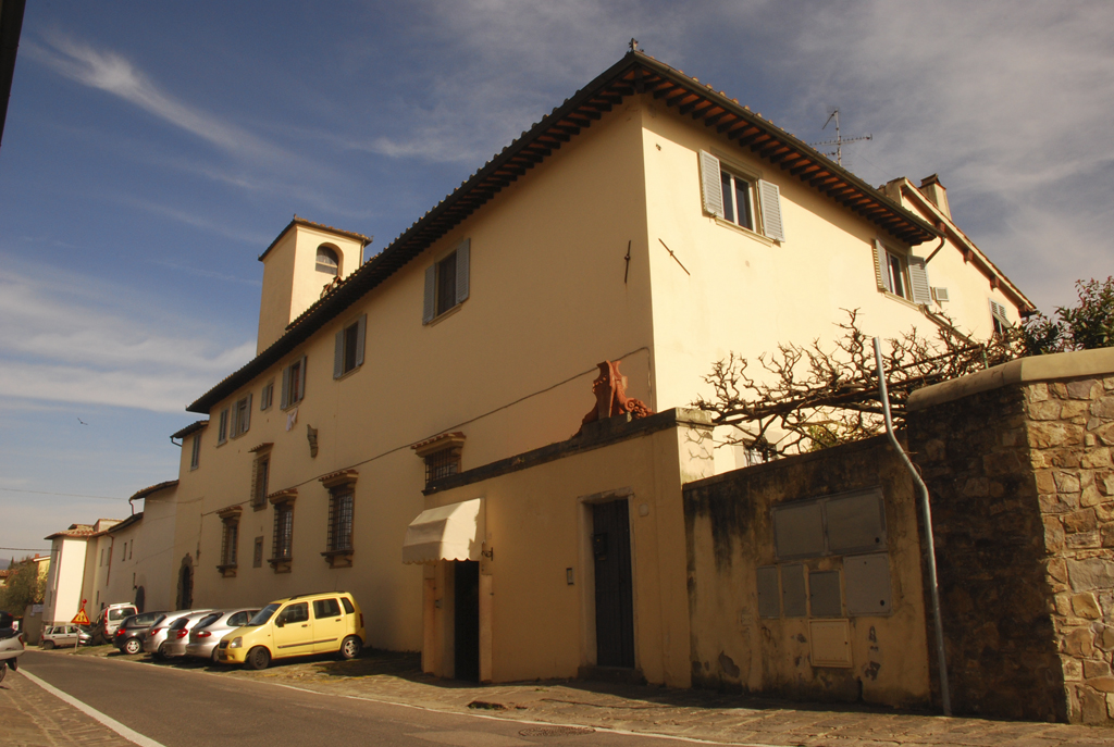 Villa di Malavolta or Villa Bottai, Florence, Italy. Overview from via del Podestà.